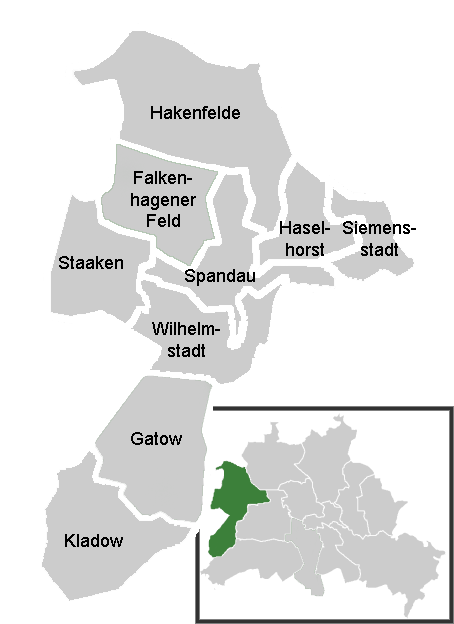 Ortsteile im Bezirk Spandau von Berlin